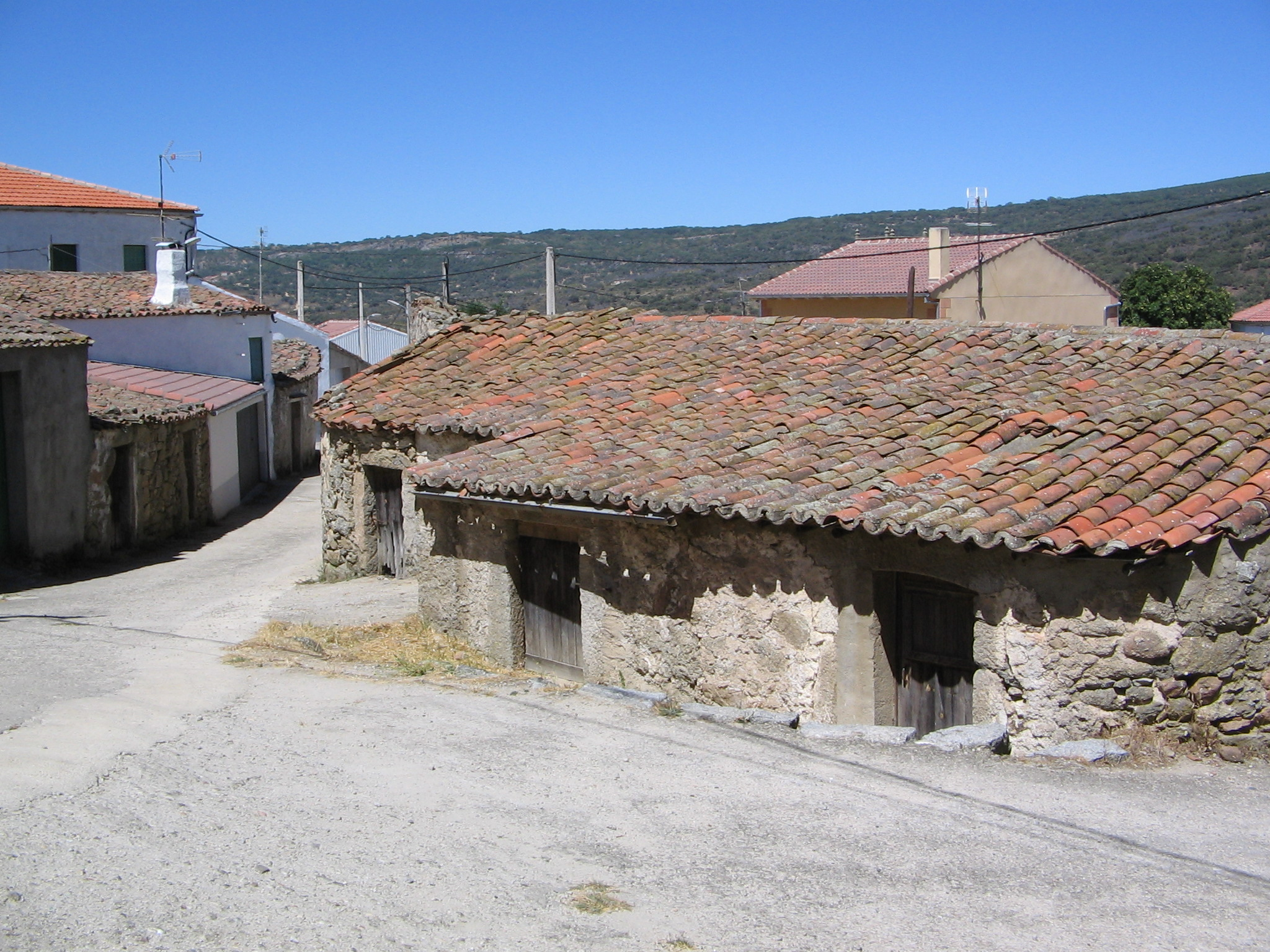 Los pajares donde guardar el heno, aperos de labranza y los animales usados en las labores de campo, burros, vacas, cabras... eran unos pequeños edificios de piedra, que poco a poco han ido desapareciendo de este y otros pueblos a causa de la modernización de los edificios.